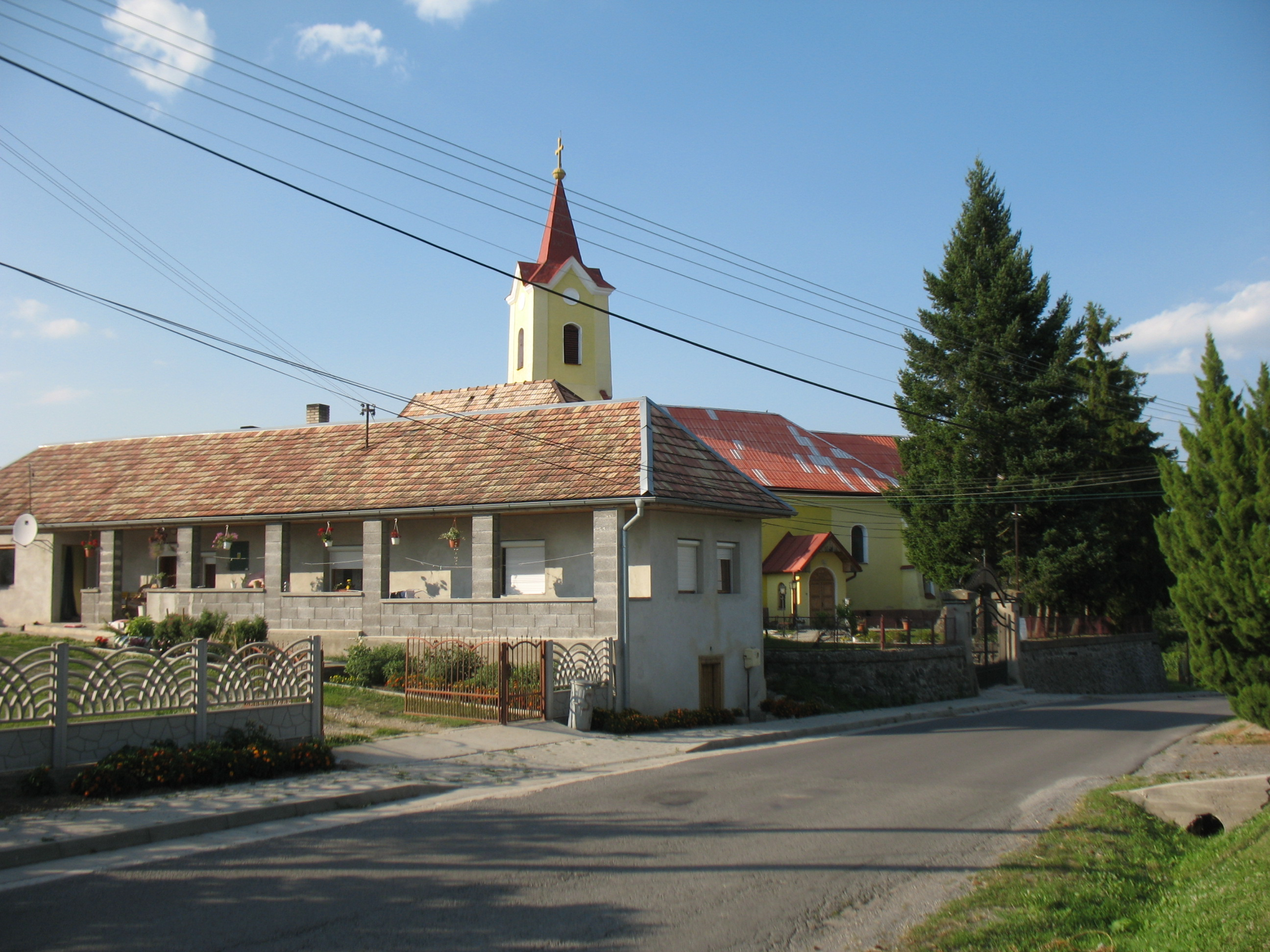 Kőkeszi